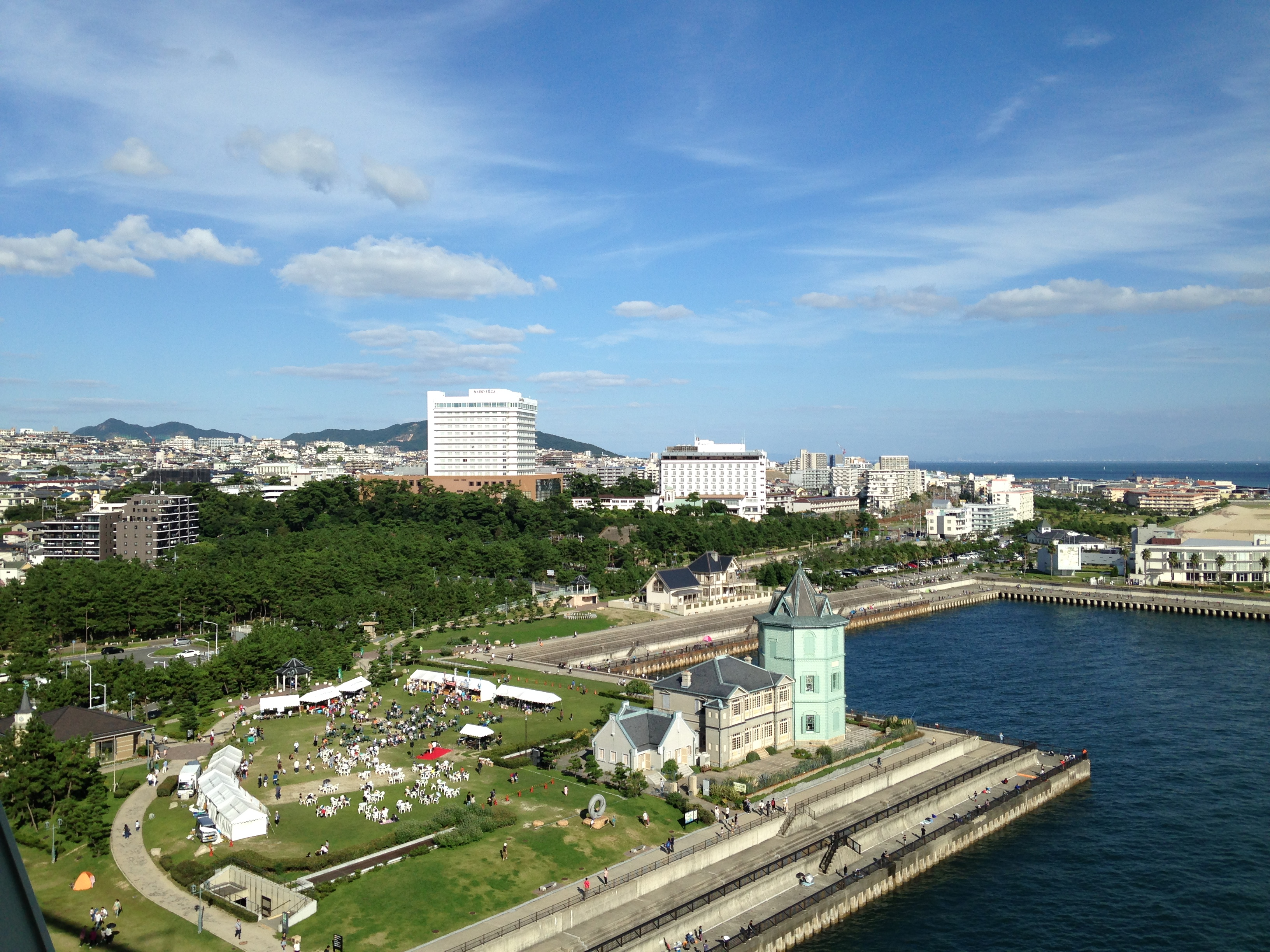 舞子海上プロムナードより望む兵庫県立舞子公園